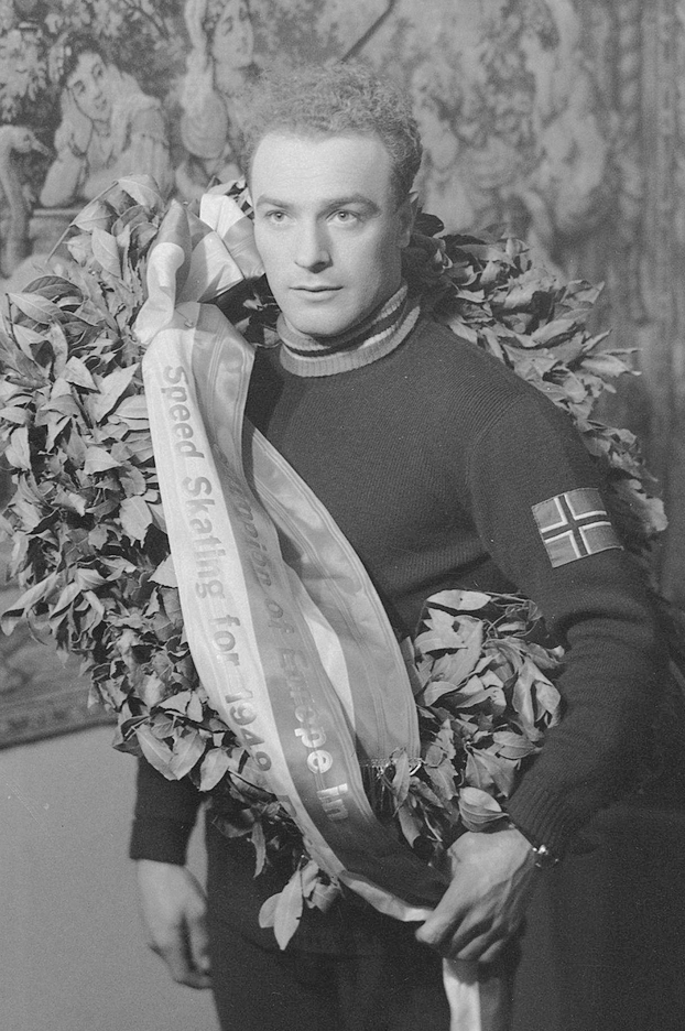 Skøyteløperen Sverre Farstad